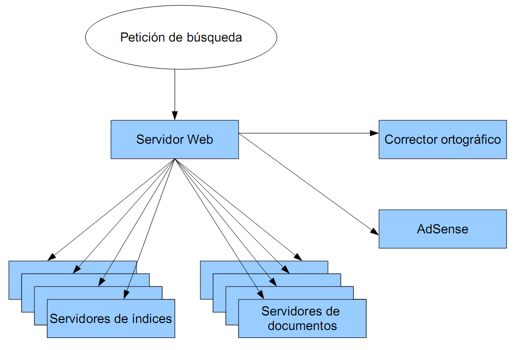 Google architecture, arquitectura de Google